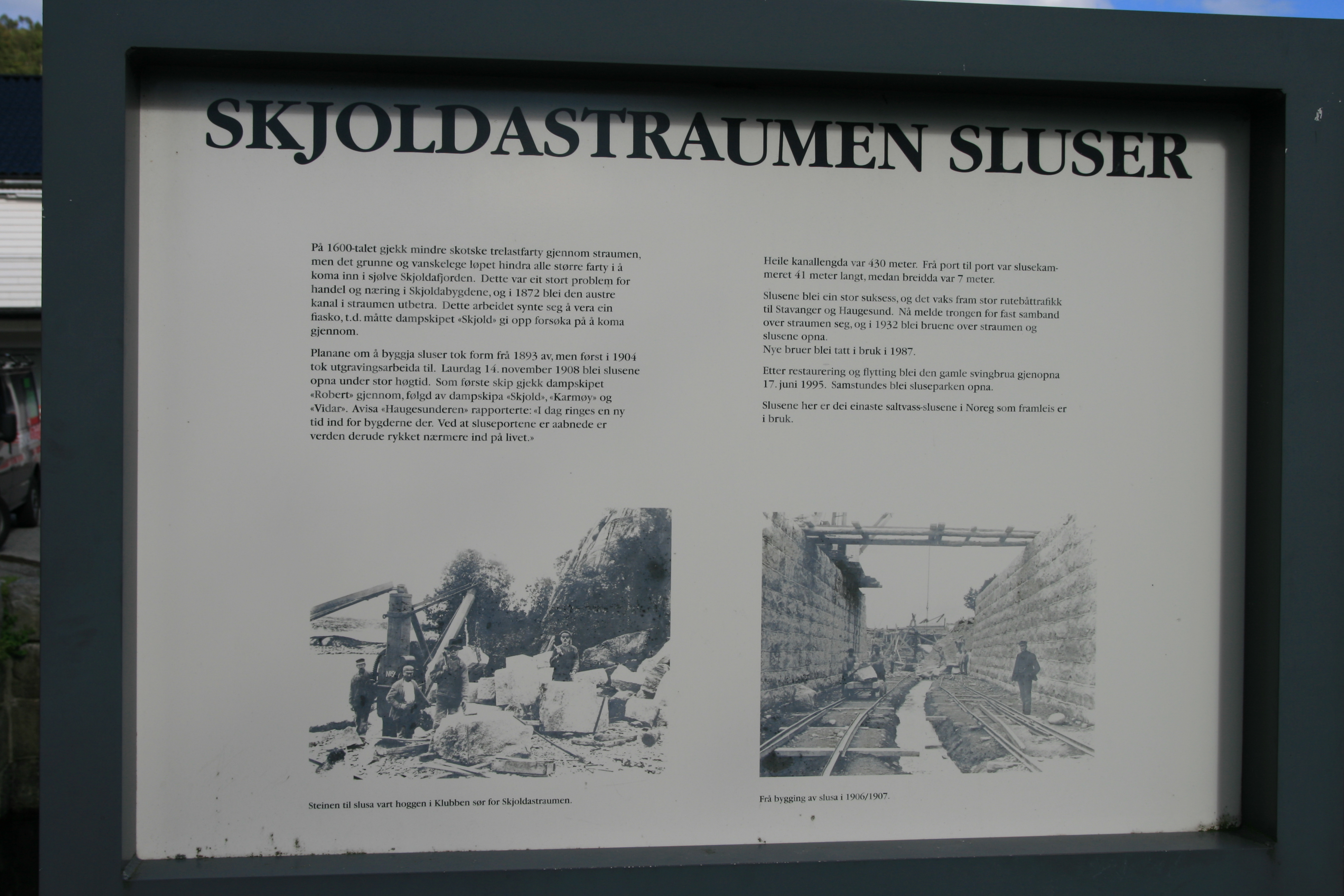 Skjoldastraumen sluser, information